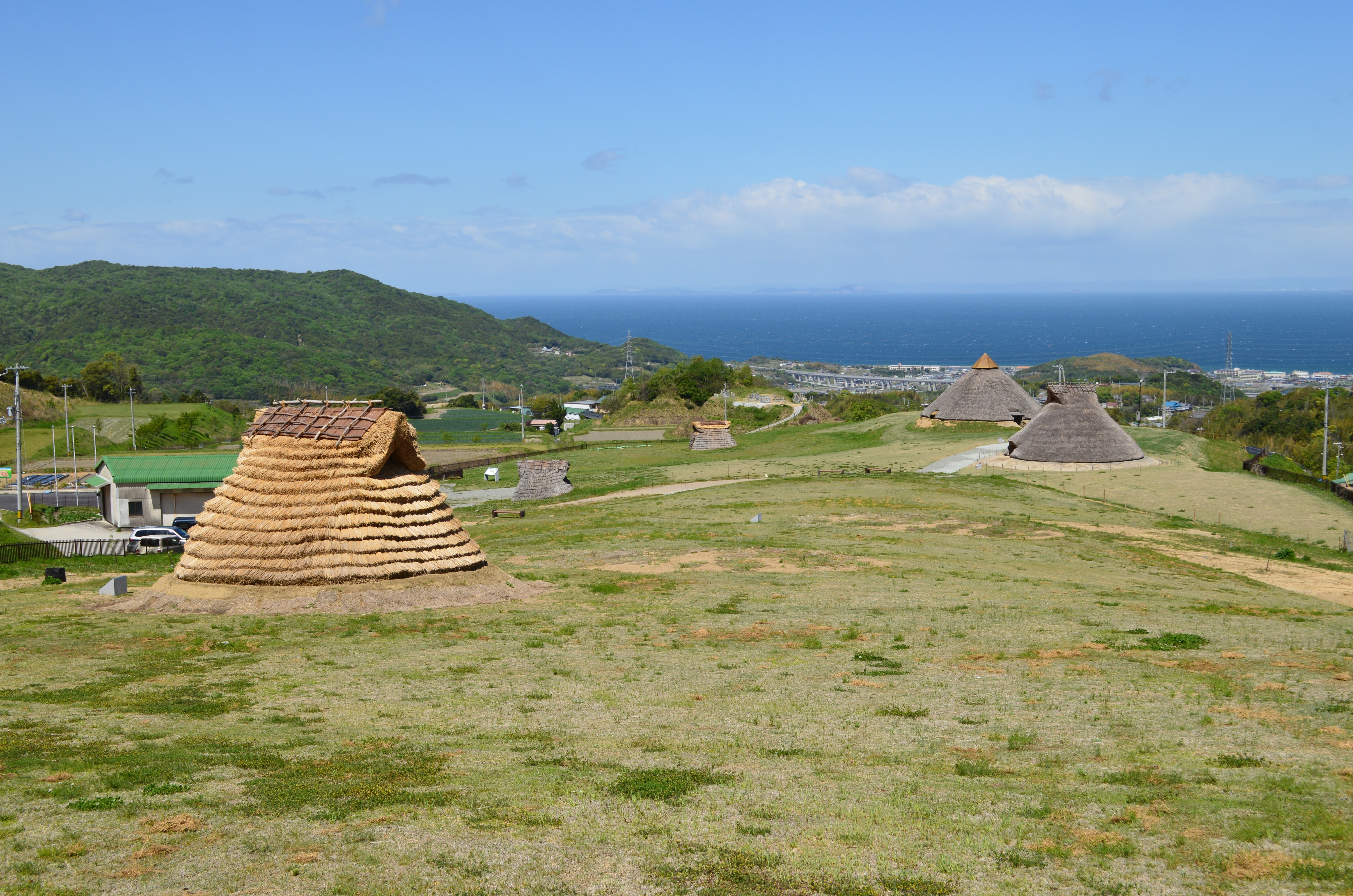 五斗長垣内遺跡 全景 Nikon D3200